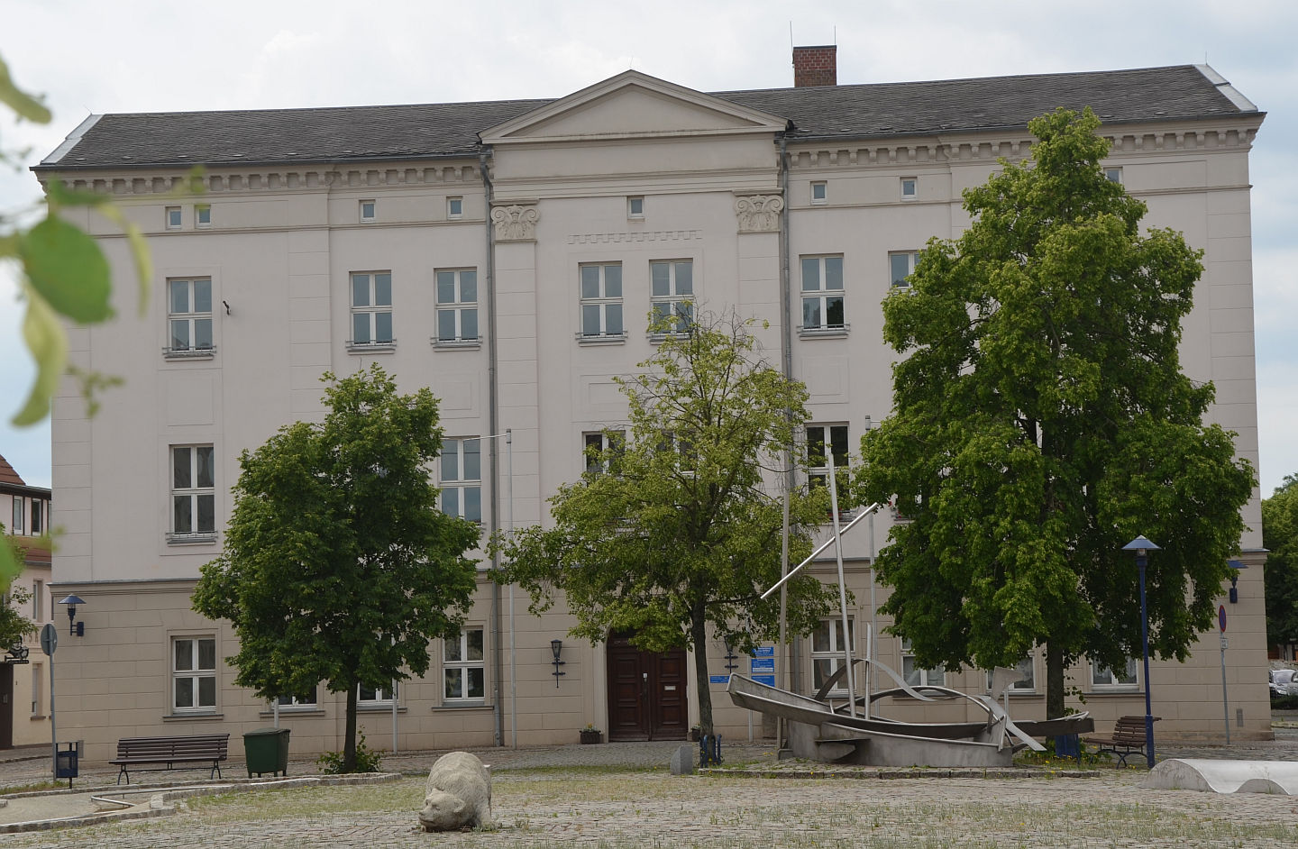 Rathaus in Roßlau